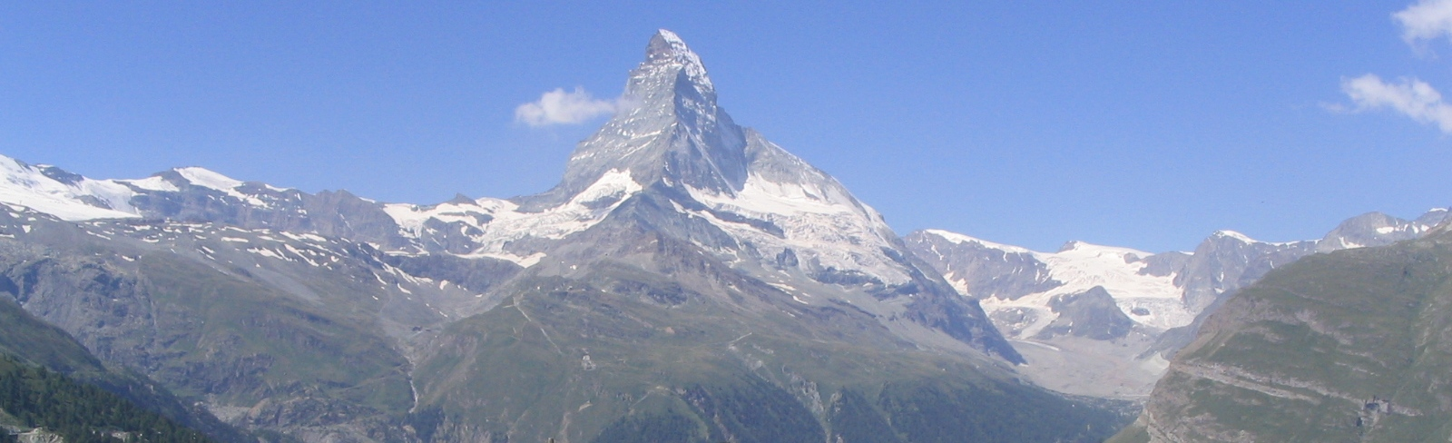 Vista panoramica del monte Cervino (Matterhorn).